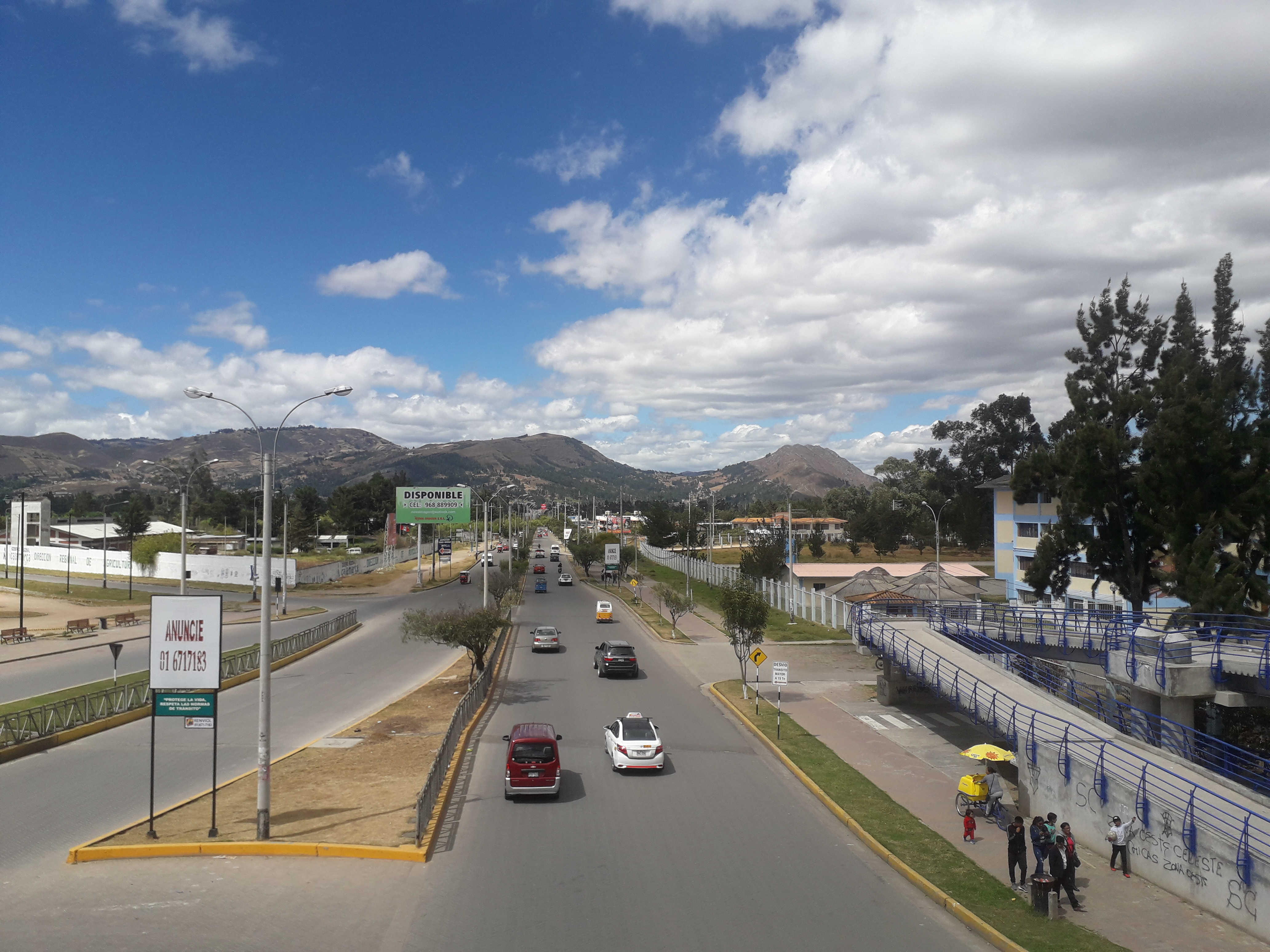 Vista de la avenida Atahualpa desde el puente peatonal Qhapac Ñan.